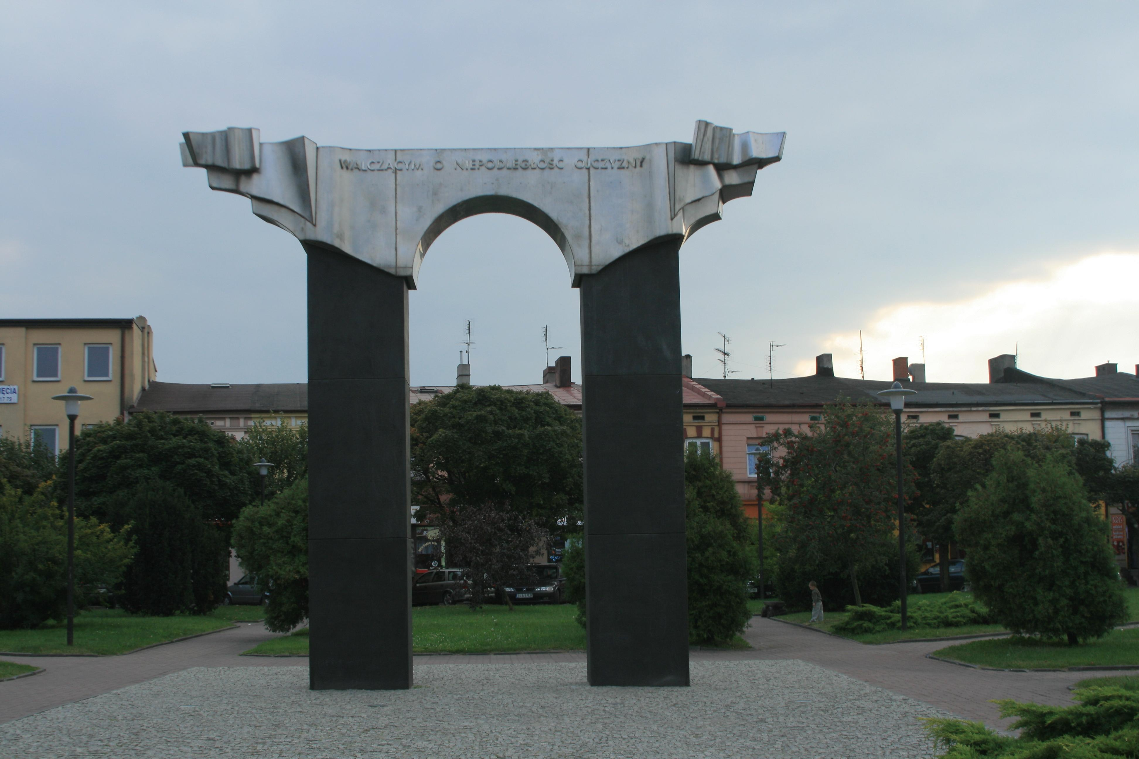 Łask, Poland